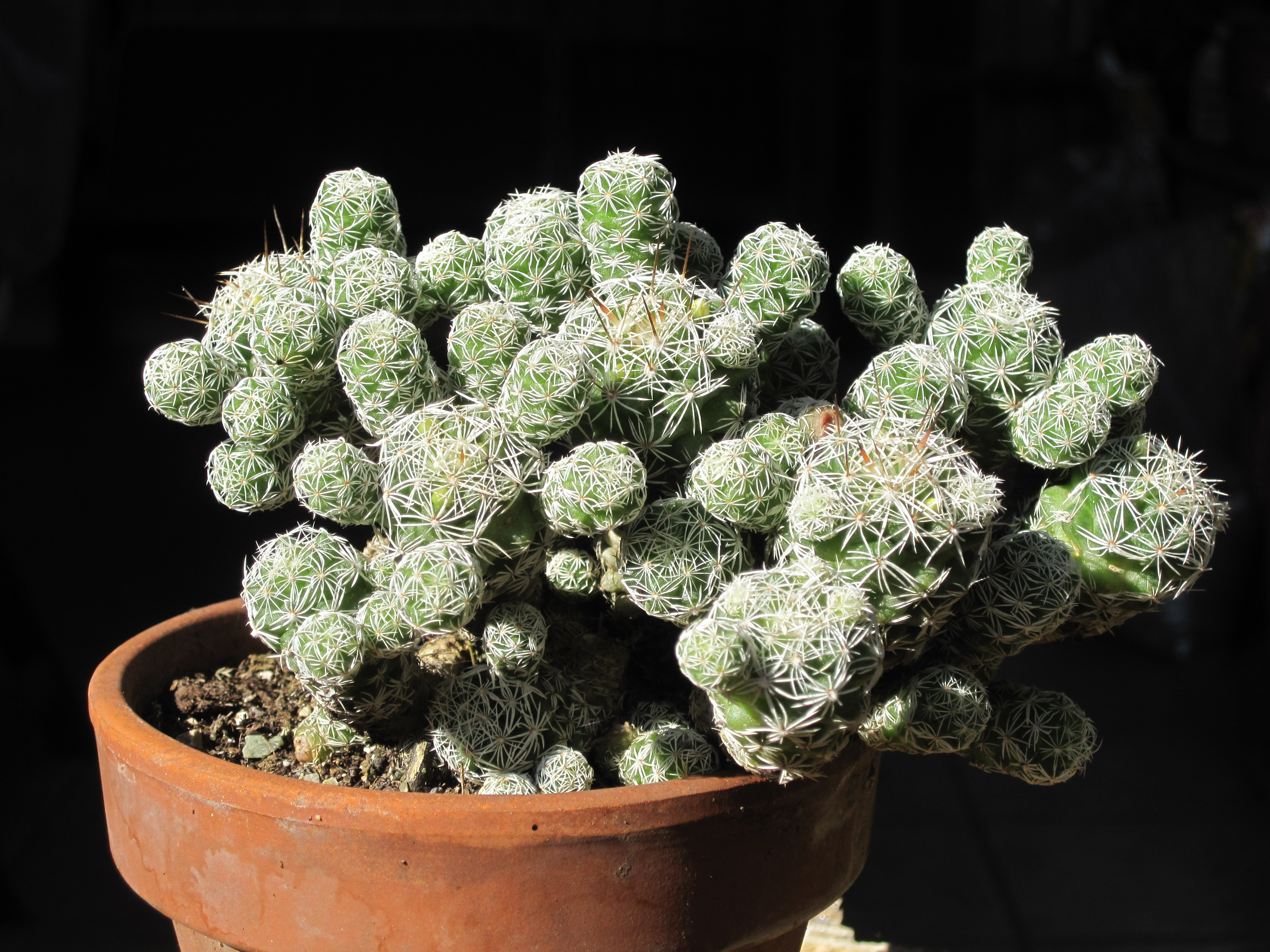 Esemplare di mammillaria vetula sub. gracilis